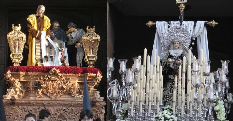 Nuestra Señora de la Soledad, s. XVIII. Semana Santa de Palencia.